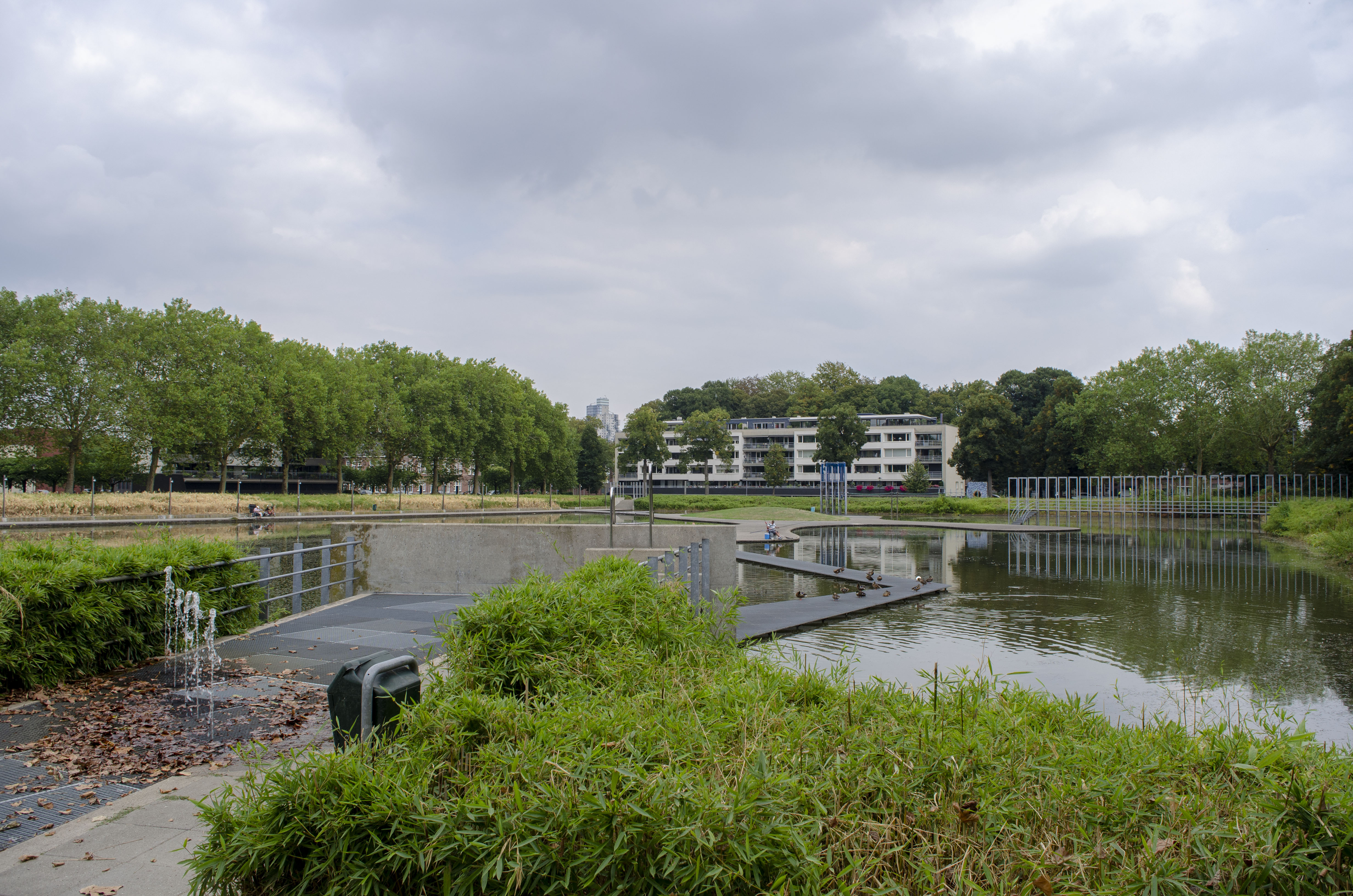 foto vanuit het zuiden